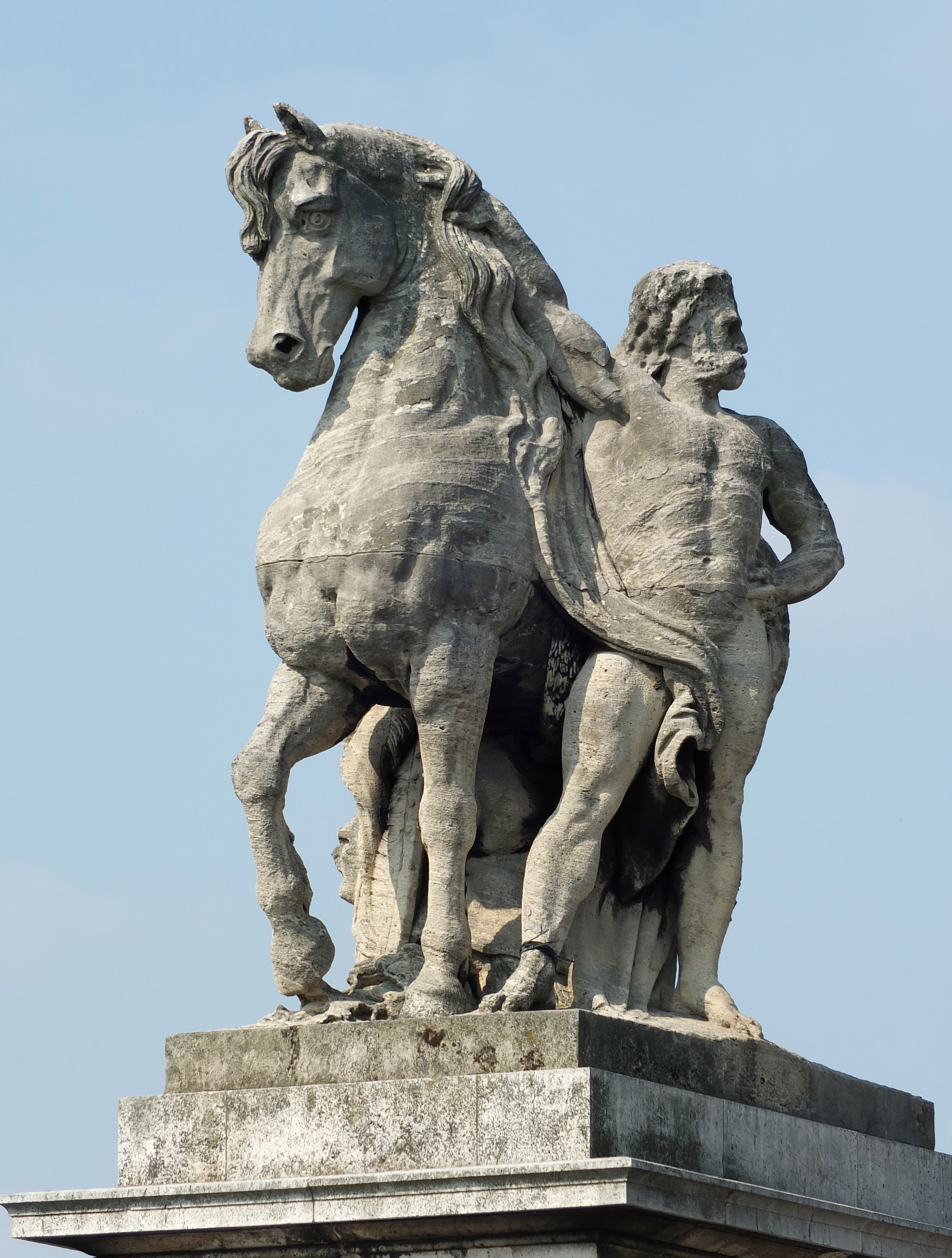 Pont d'Iéna, Paris,cavalier gaulois rive gauche, coté amont. Sculpture en calcaire d'Antoine-Augustin Préault (1809-1879), installé en 1853.